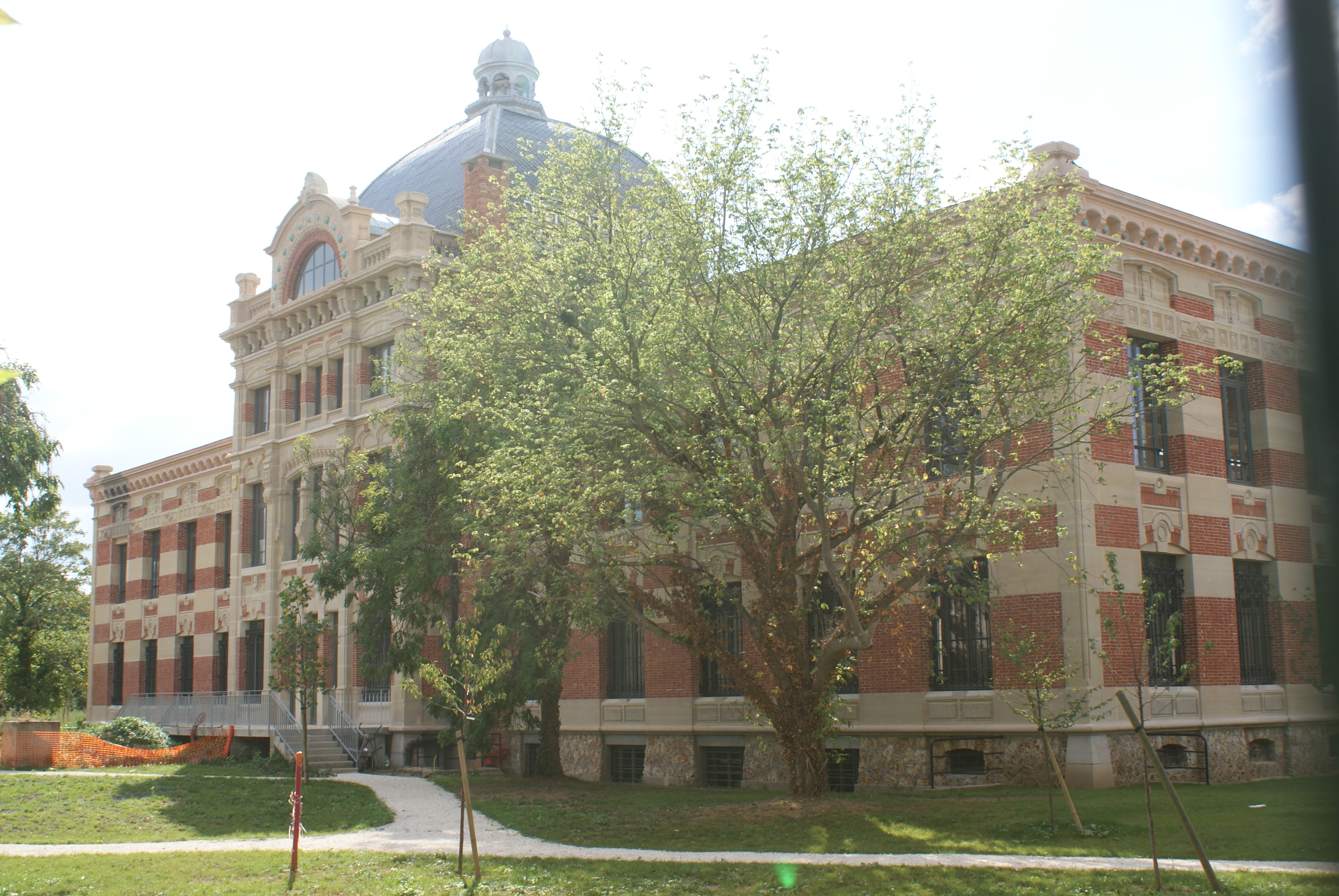 Usine Pharmaceutique du Docteur Pierre en 2017 après rénovation, vue depuis la rue Becquet, Nanterre.